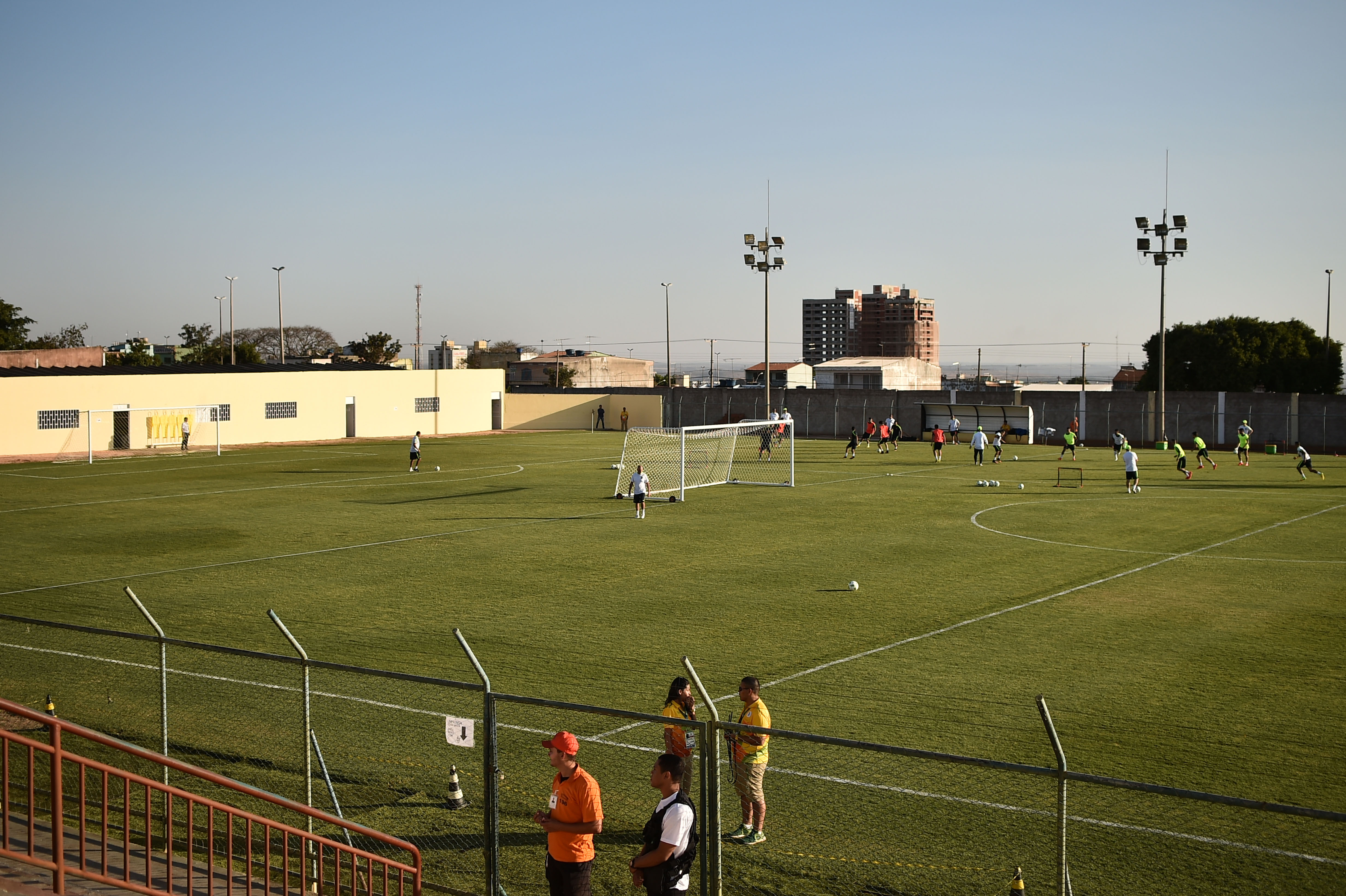 Estádio Maria de Lourdes Abadia (Abadião), Ceilândia, Brasília, DF, Brasil 6/8/2016 Foto: Andre Borges/Agência Brasília. Neste sábado (6), das 16 às 17 horas, a seleção brasileira masculina de futebol treinou no Estádio Maria de Lourdes Abadia (Abadião), em Ceilândia. O treino foi aberto somente para a imprensa.